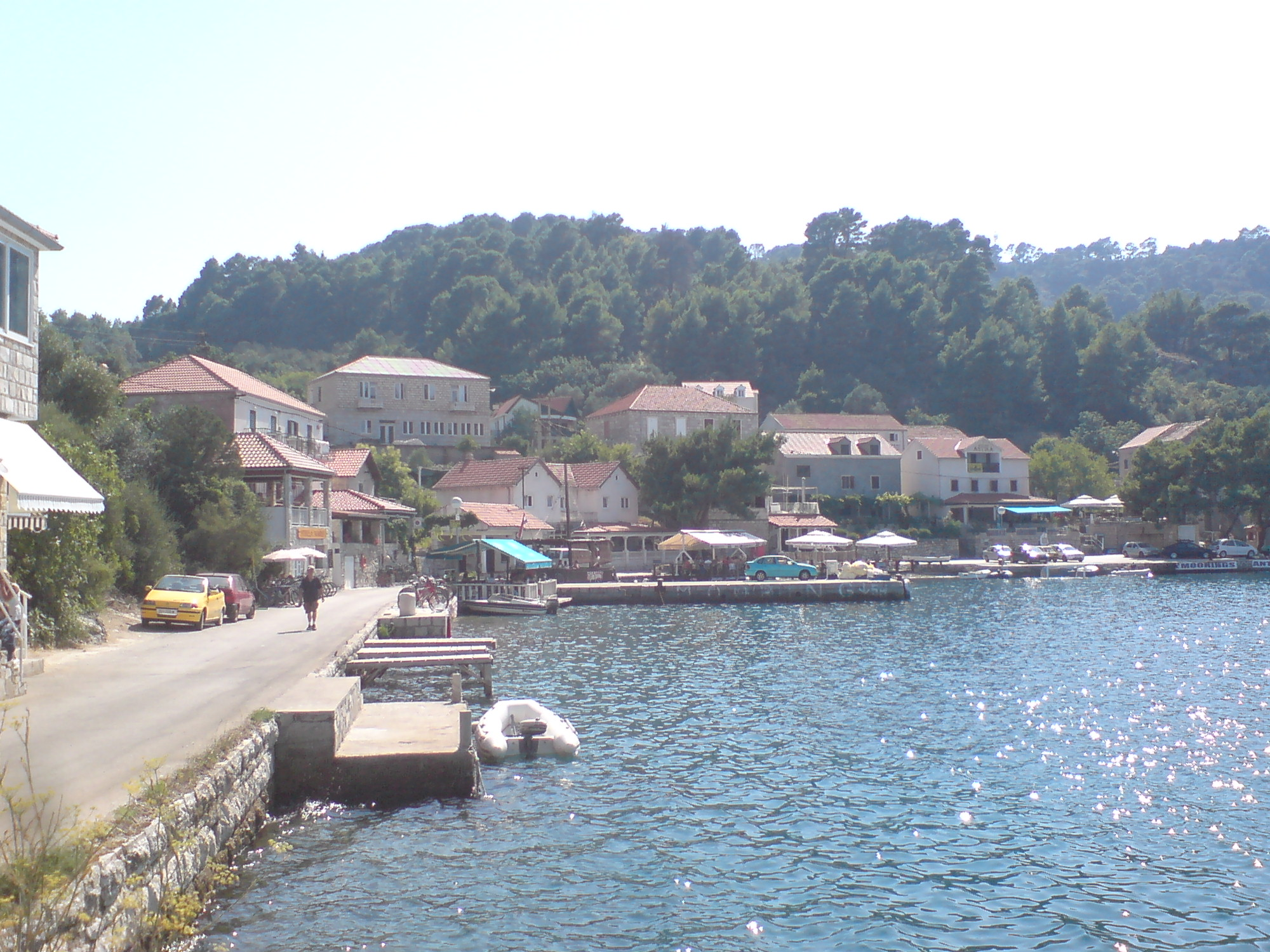 Polače center, Mljet, Croatia